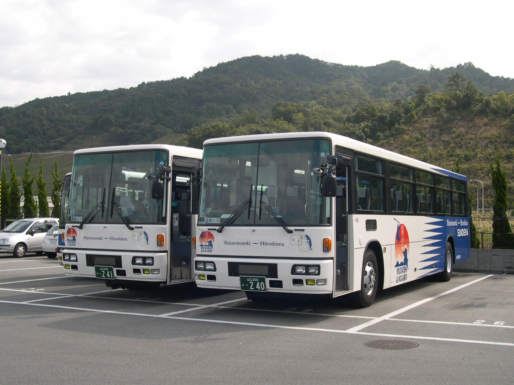 中国ジェイアールバス広島営業所にて、許可を得て撮影